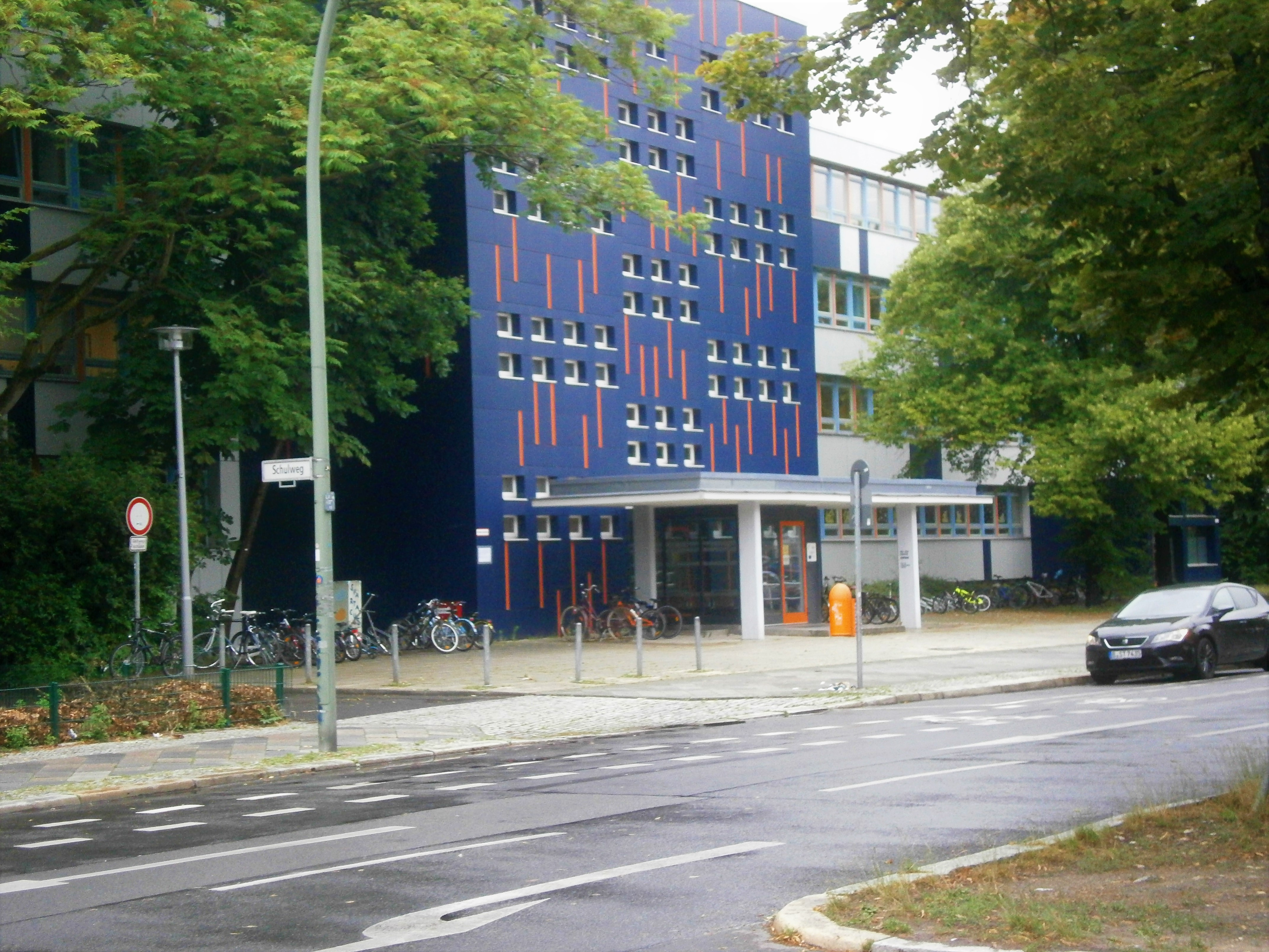 Die Friedenstraße ist eine Straße im Berliner Bezirk Friedrichshain-Kreuzberg, Ortsteil Friedrichshain. Angelegt und benannt wurde sie 1871-1876 auf dem Communicationsweg außerhalb der abgerissenen Berliner Zollmauer. Bereits seit dem Anlegen und der Bebauung bestand eine Teilung der Straße auf Königstadt und Stralauer Viertel. Aktuell sind es drei unterschiedene Straßenabschnitte: regionale Straßenverbindung im Barnimkiez am Volkspark Friedrichshain, am Platz der Vereinten Nationen als Parkzone, südlich im (Planungsraum) "Friedenstraße" als Ergänzungsstraße. Das Bild zeigt die Einmündung des Schulweg auf die Friedenstraße, rechts daneben der Eingang der Spartacus-Grundschule, Friedenstraße 40—45.